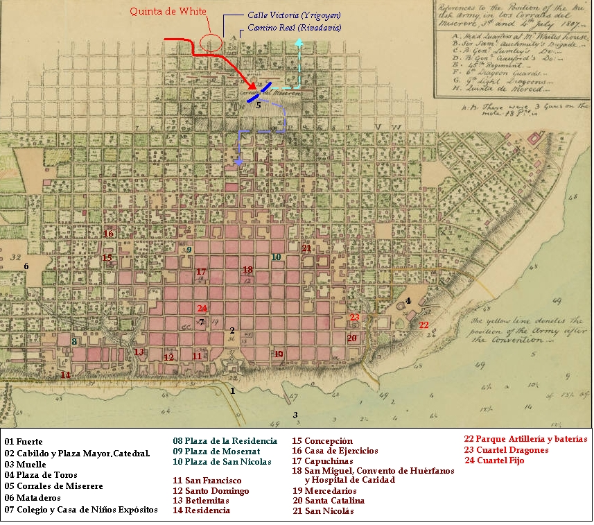 Esquema del combate de Miserere (1807)